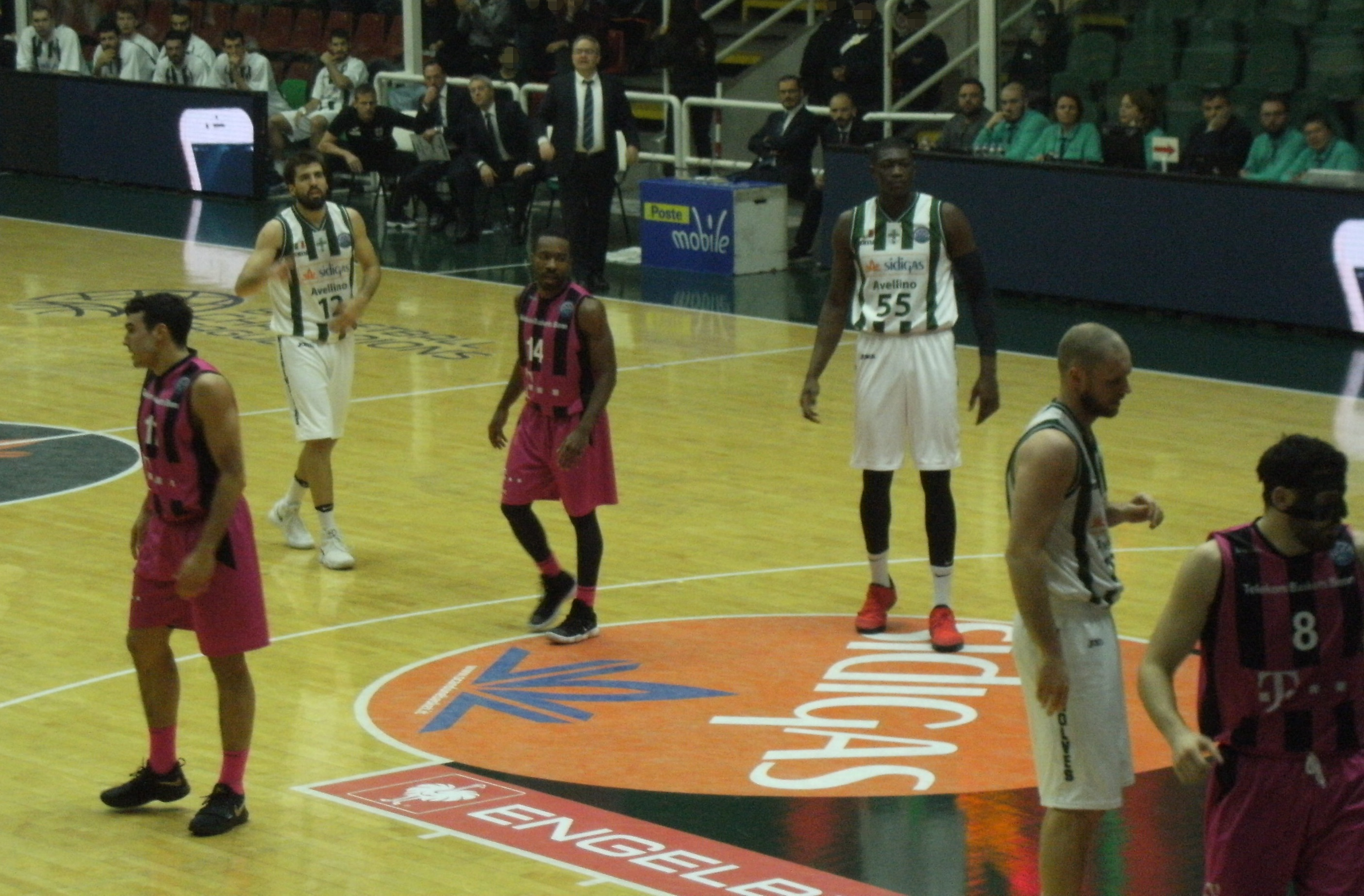 Società Sportiva Felice Scandone - Telekom Baskets Bonn 61-69 Palasport Giacomo Del Mauro di Avellino 06/12/2017 Basketball Champions League